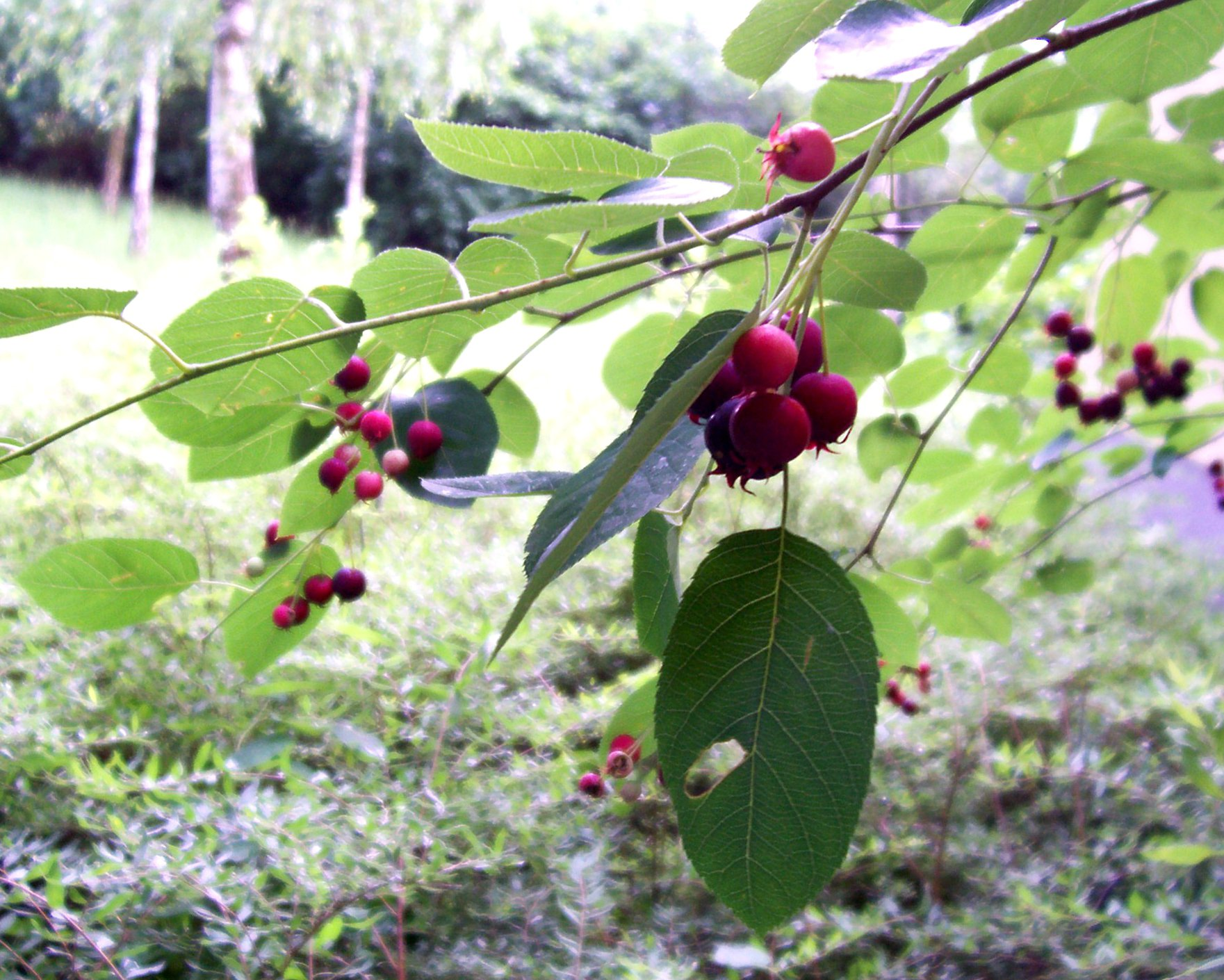 Kupfer-Felsenbirne (Amelanchier lamarckii)